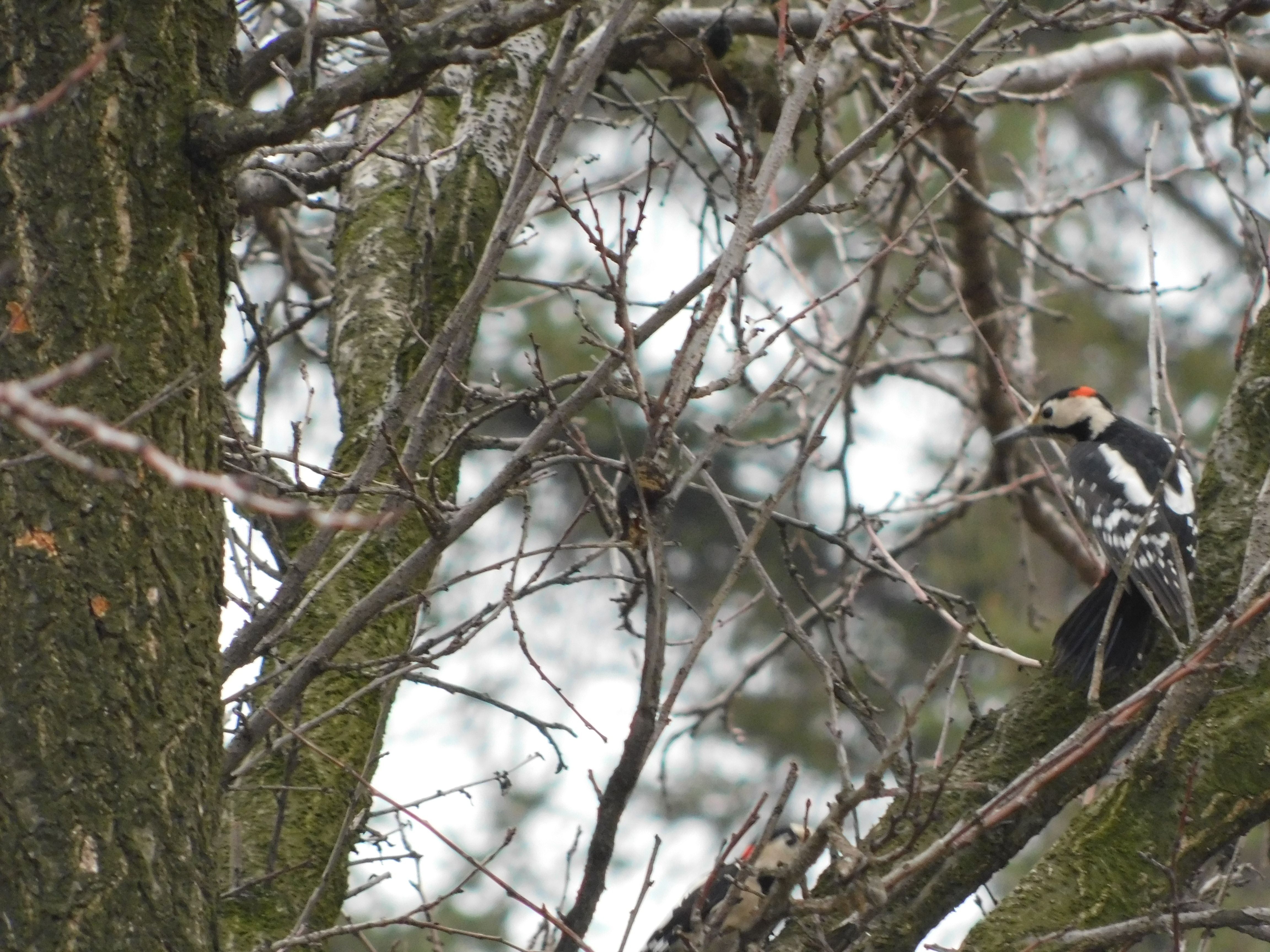 Srpski (latinica): Seoski detlić (Dendrocopos syriacus) je vrsta ptice iz porodice detlića (Picidae). Gnezdi se na teritoriji cele Srbije. Naseljava mozaična poljoprivredna staništa, gradska i seoska naselja u nizijama i pobrđu. Odsustvuje u planinama i u većim šumskim kompleksima. U Srbiji je bio prisutan još s kraja 19. veka, a značajnije se proširio prvom polovinom 20. veka. Stanarica. (Šćiban i sar., 2015). Smatra se da je populacija u blagom porastu i procenjuje se da broji od 23.000 do 30.000 gnezdećih parova (Puzović i sar., 2009).